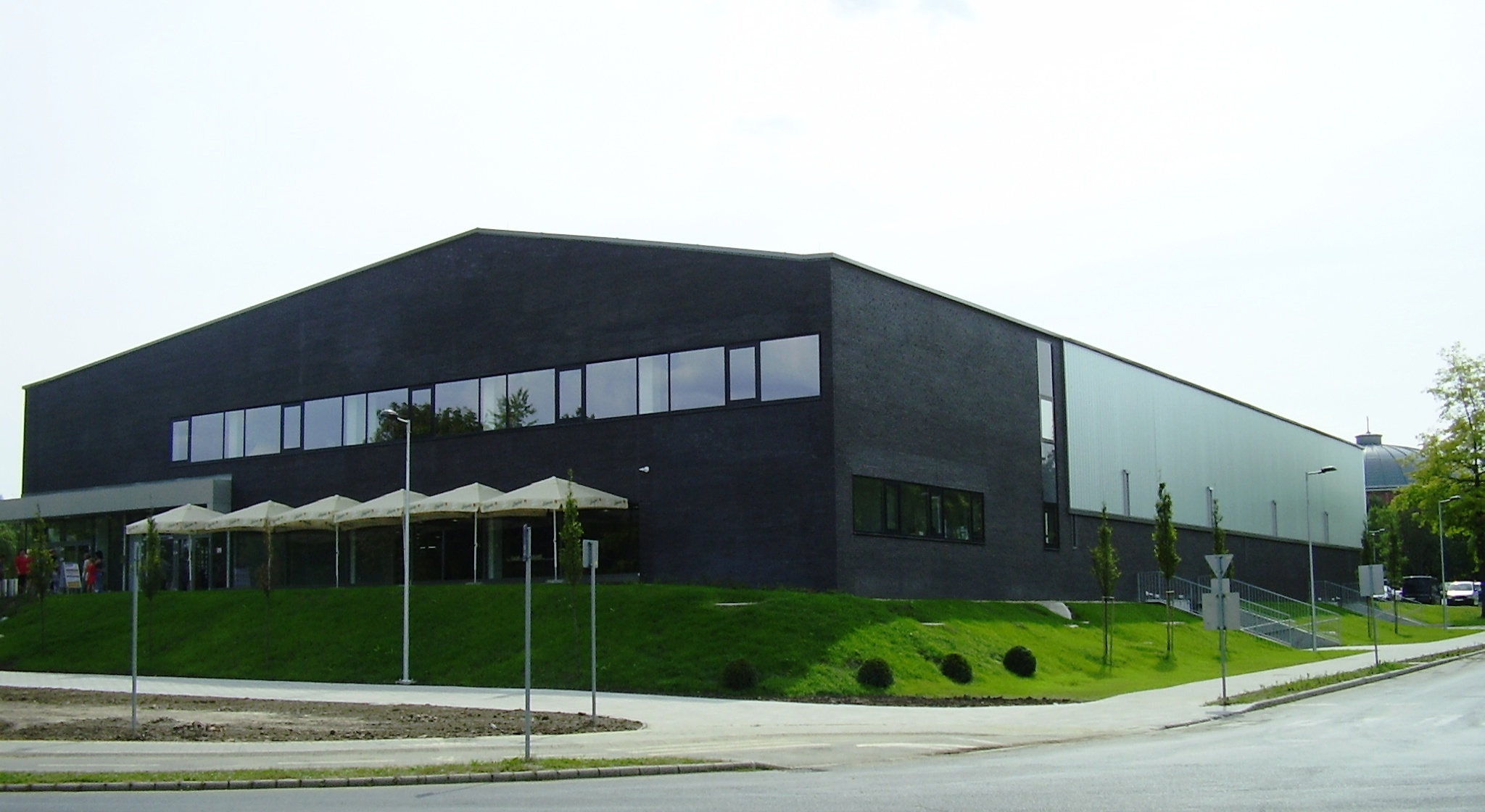 A Don Bosco Sportcsarnok Kazincbarcikán.